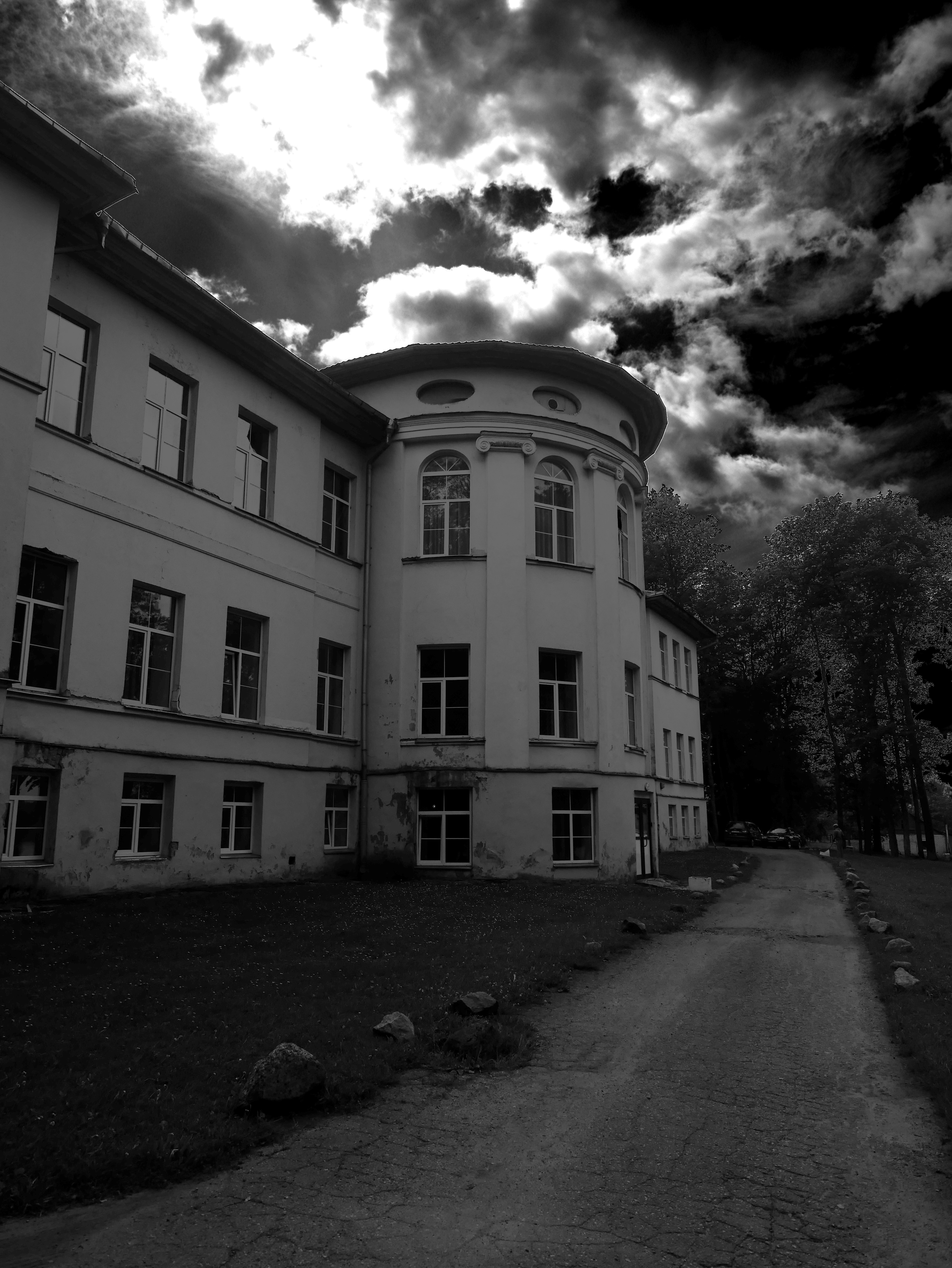 Balvi mõisa peahoone tagakülg